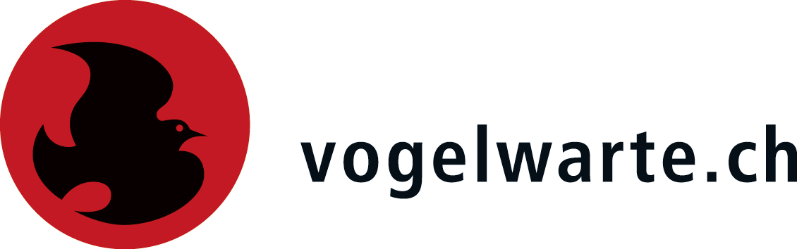 Logo der Schweizerischen Vogelwarte Sempach.